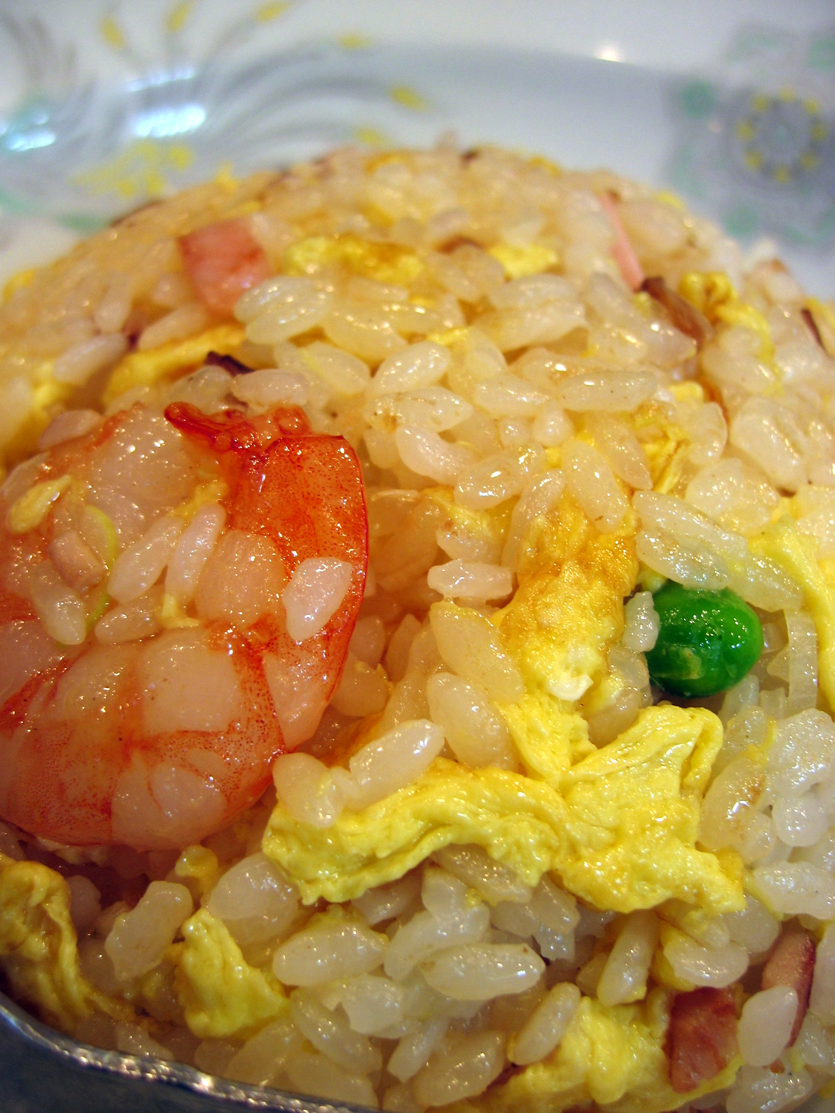 接写 closeup